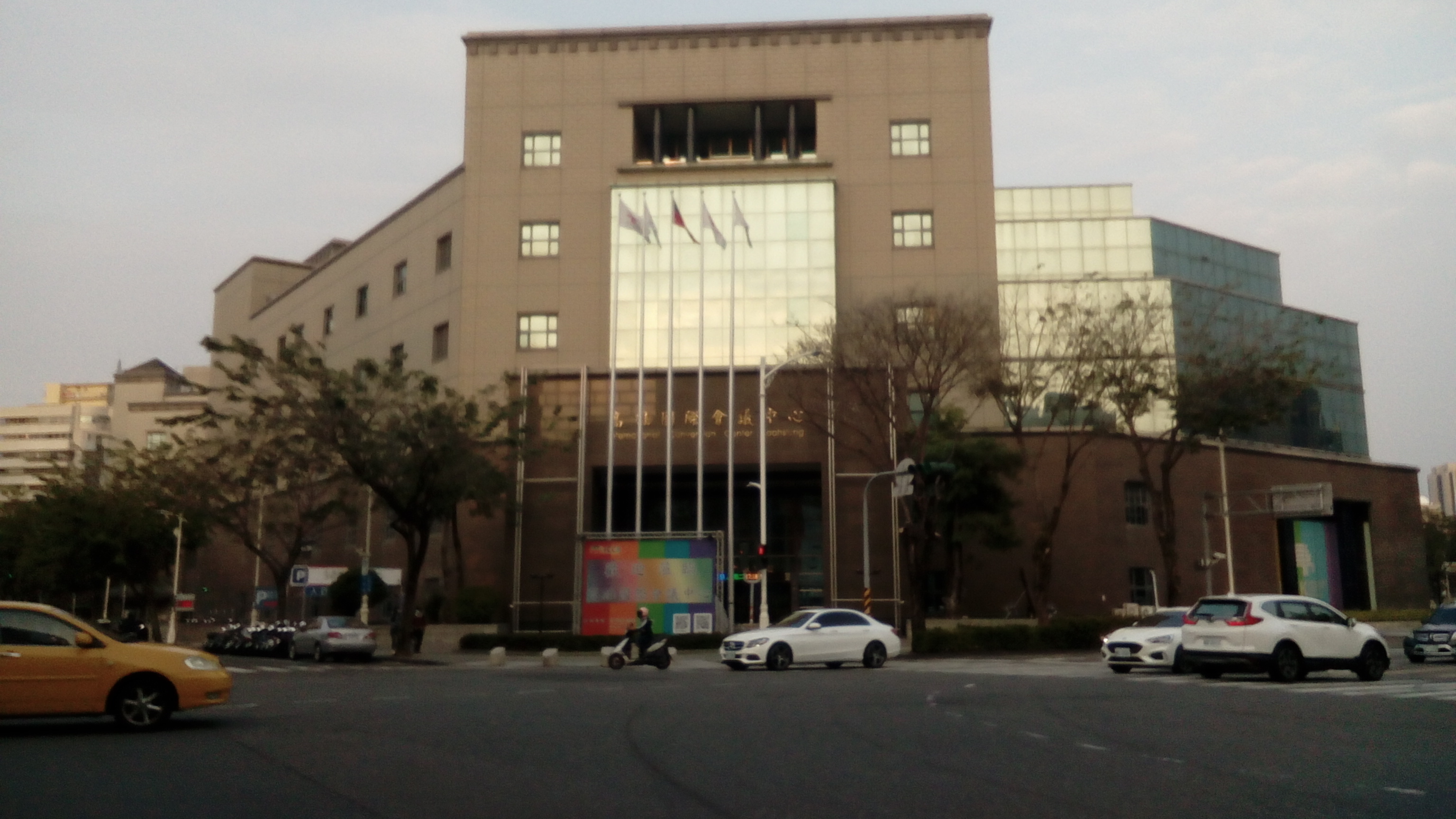 中文（台灣）: 夕陽下的高雄國際會議中心正面。